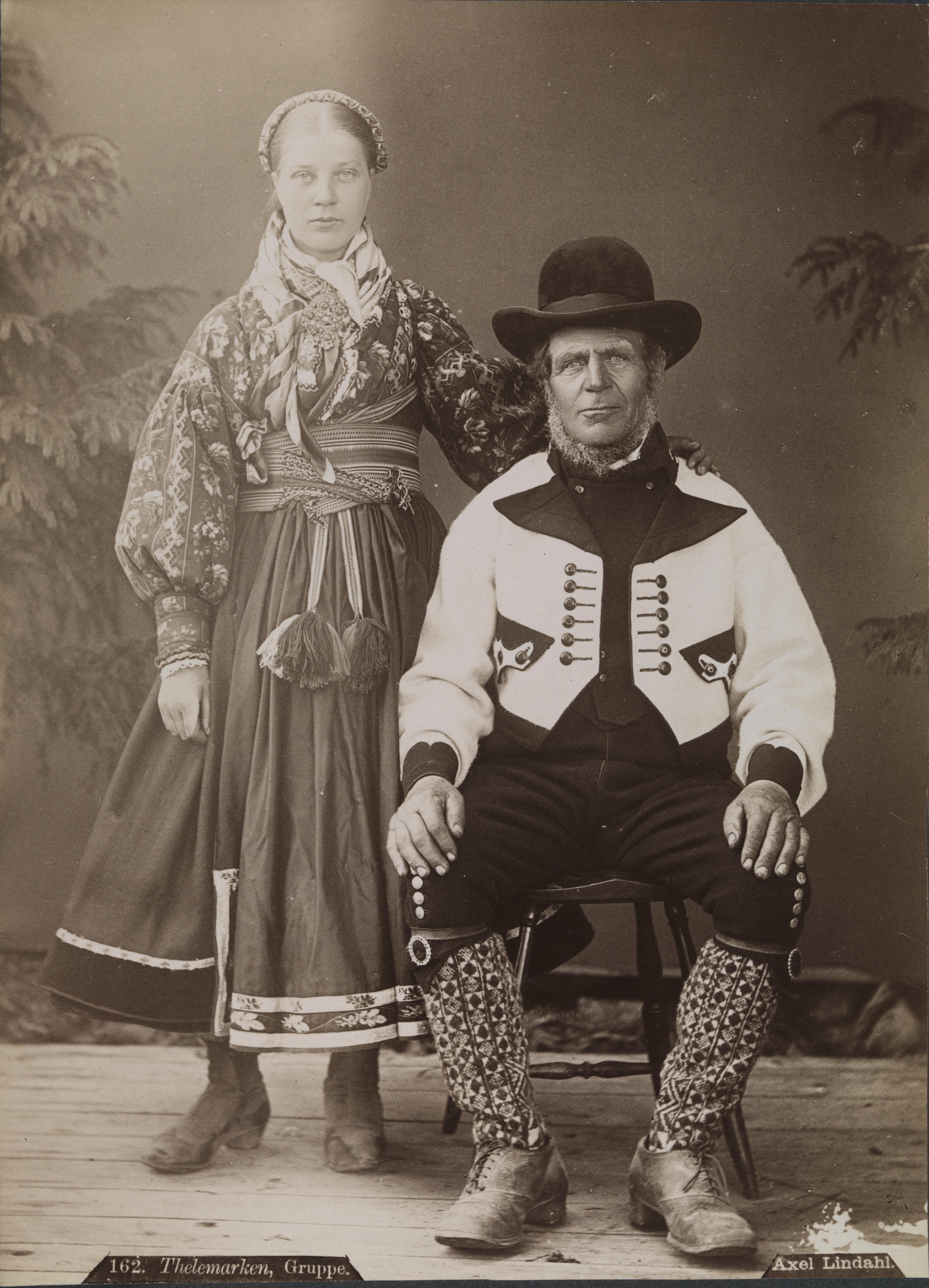 Sted: Kommune: Fylke: Tagger: bunader folkedrakter hodeplagg kvinner menn portrettfotografi